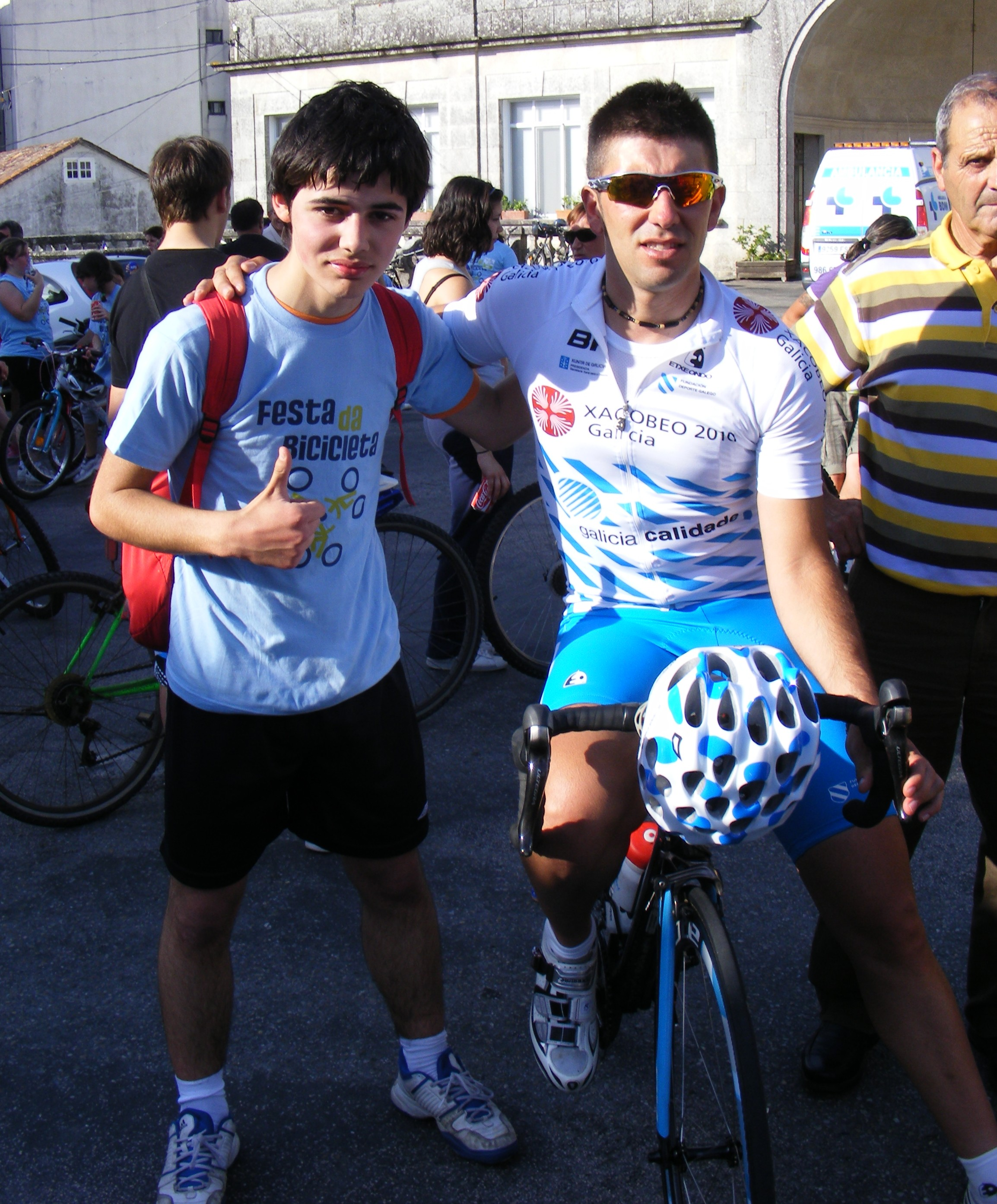 Serafín Martínez Acevedo ciclista español a la derecha con un fan